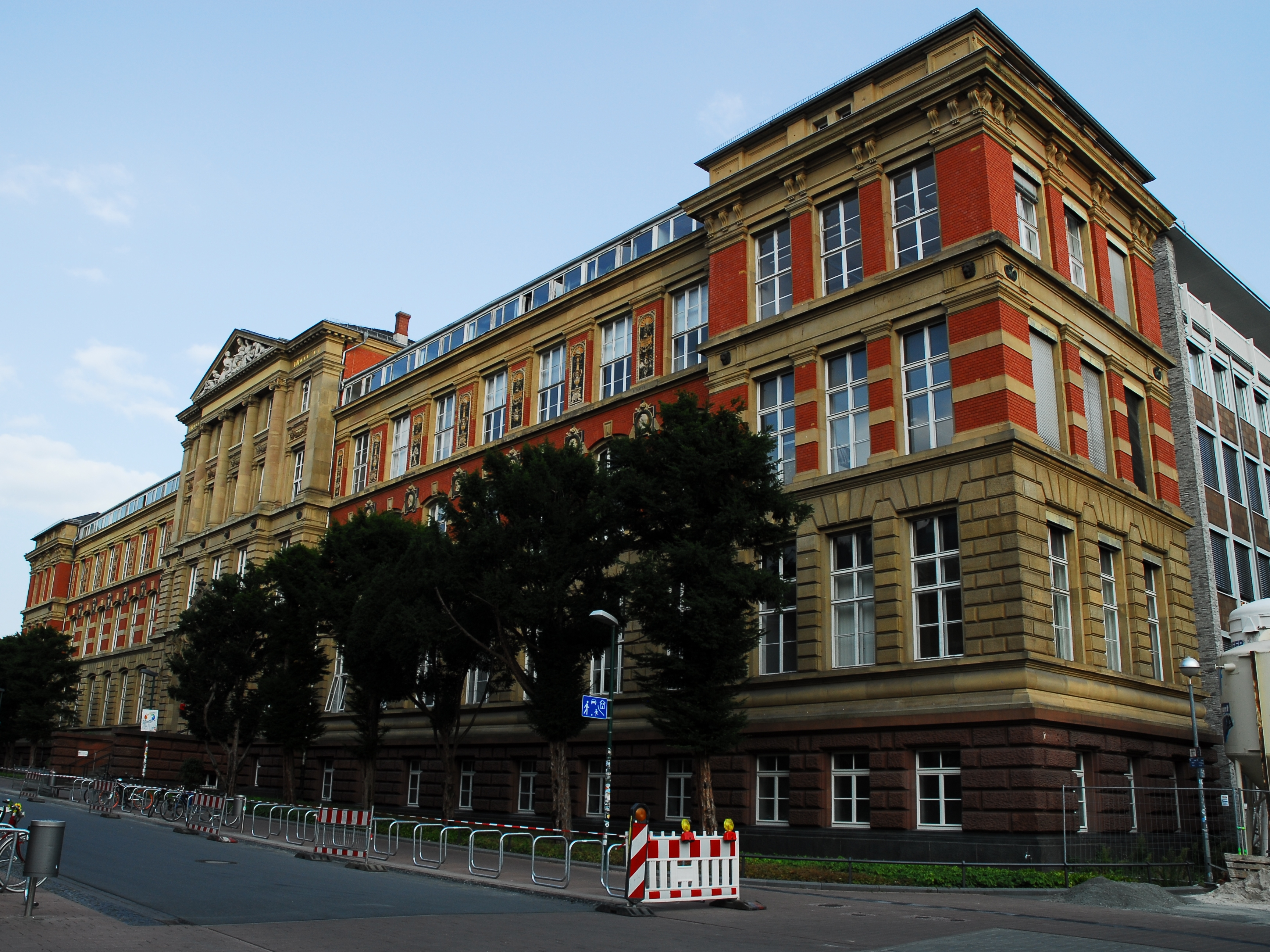 Altes Hauptgebäude der Technischen Hochschule in Darmstadt, Hochschulstraße 1: gebaut 1893/95 von Architektur-Professor Heinrich Wagner.